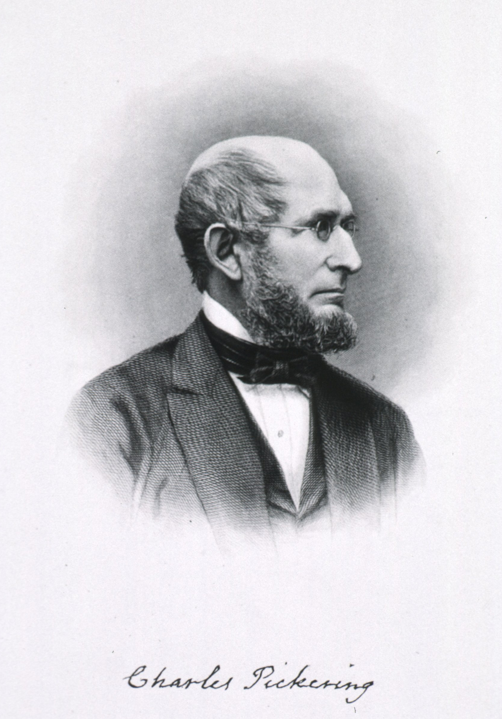 Чарльз Пикеринг, американский ученый, врач, путешественник.